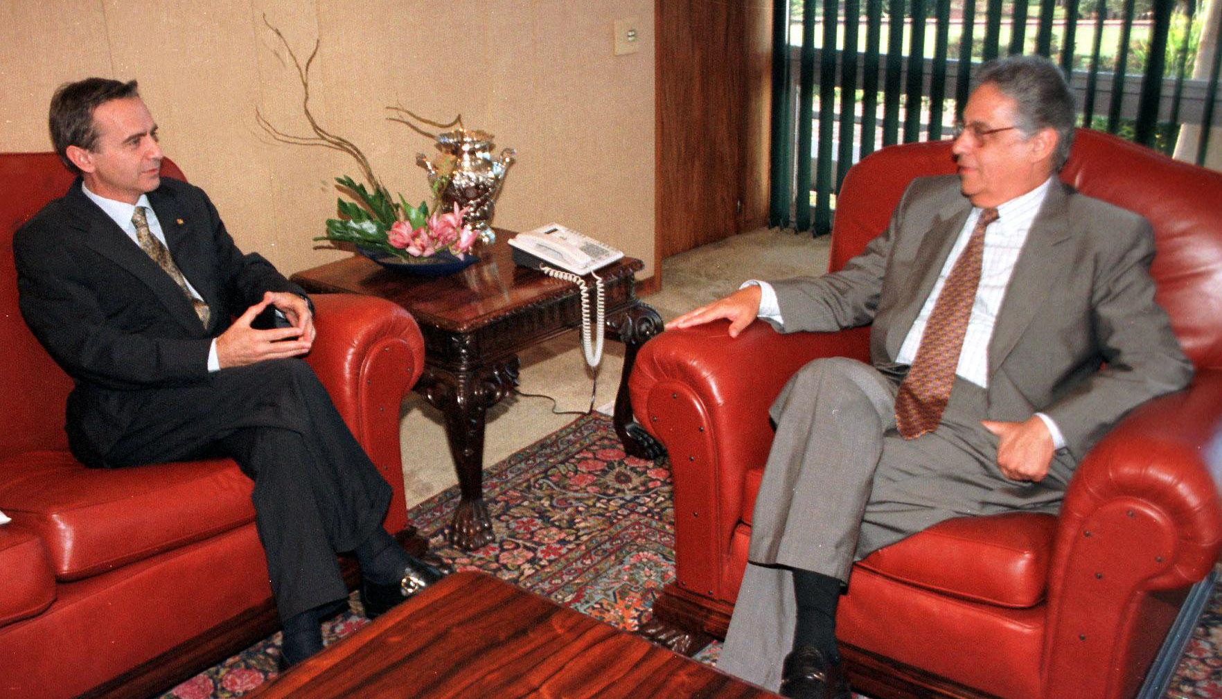 BRASILIA, 20/6/97 - PRES. FHC CONVERSA COM DEP. VICTOR MEDIOLLI, PSDB/MG.(FOTO/ERALDO PERES).